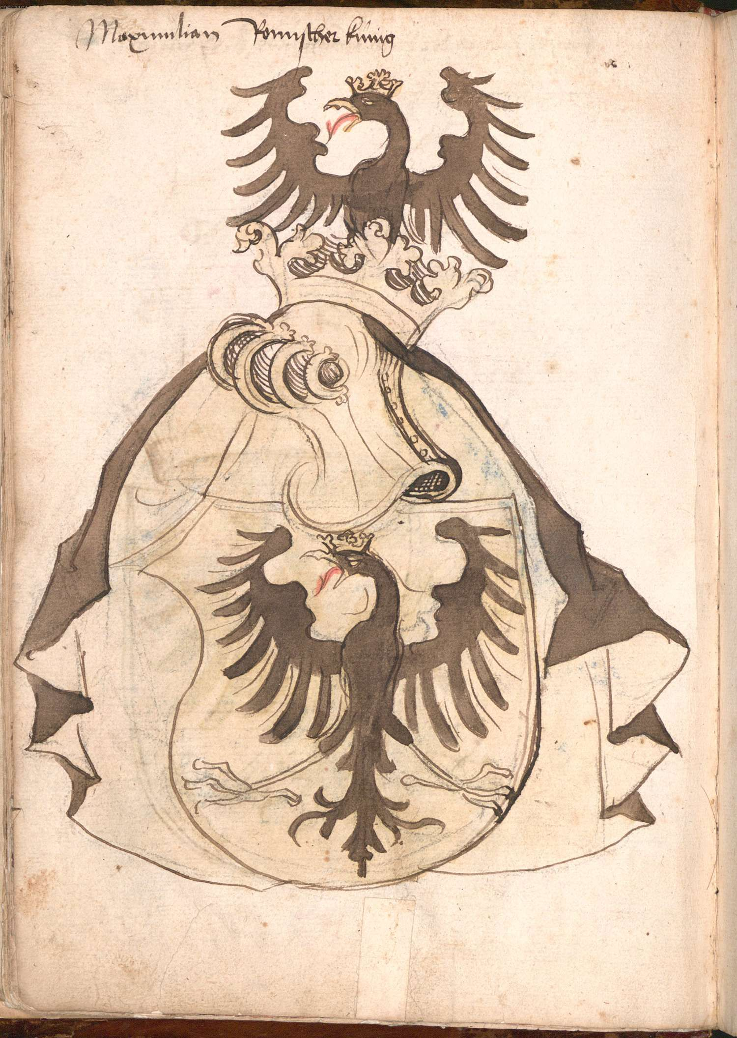 „Wernigeroder (Schaffhausensches) Wappenbuch“; Süddeutschland 4. Viertel 15. Jh.Bayerische Staatsbibliothek München, Cod.icon. 308 n Wappen ideeller Vorfahren und Wappen höchster weltlicher und geistlicher Würdenträger Maximilian I römischer König